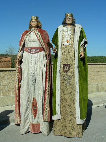 Els reis de la Vila de Torrelles de foix